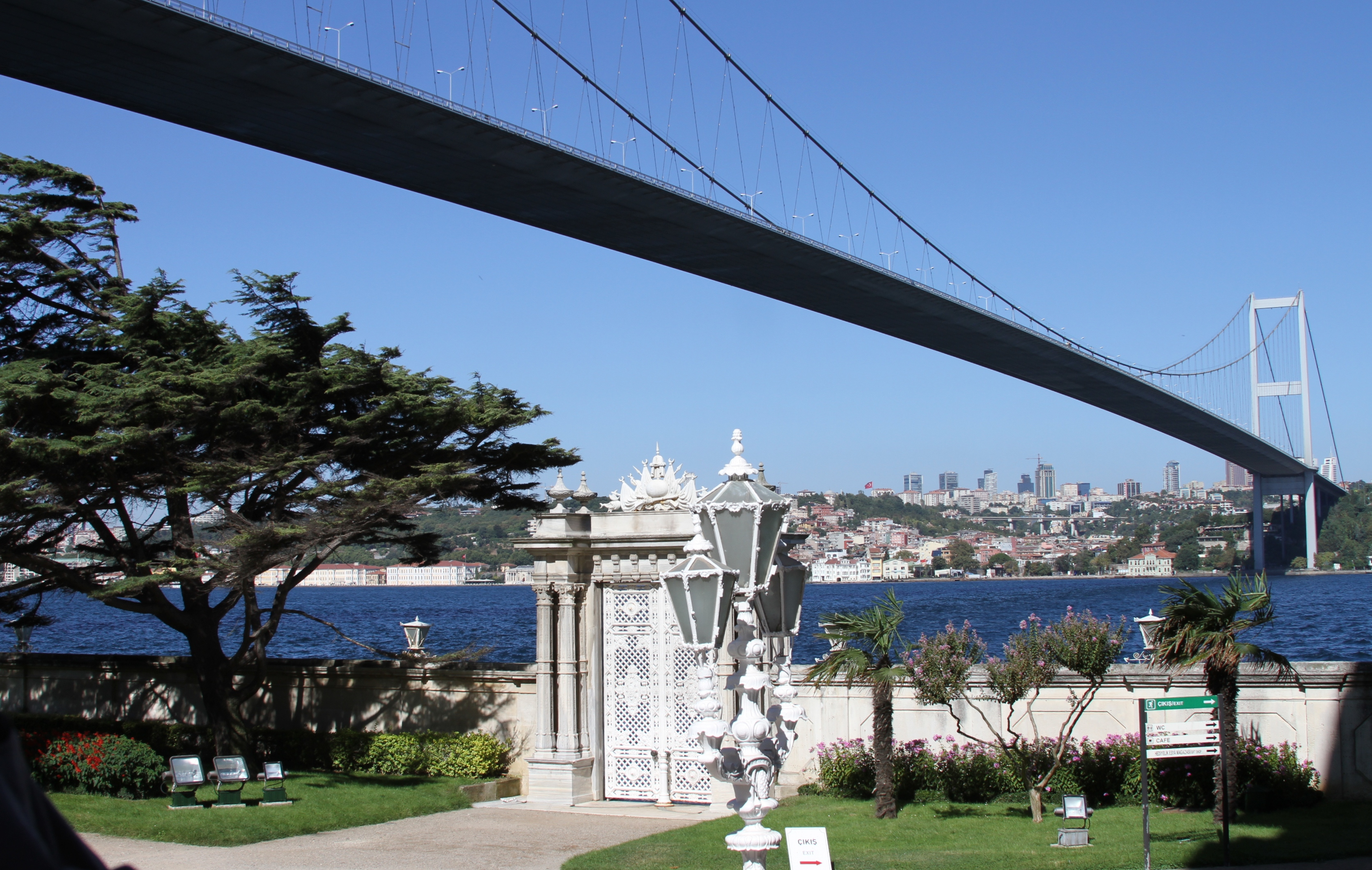 Ponte do Bósforo a partir do Palácio Beylerbey